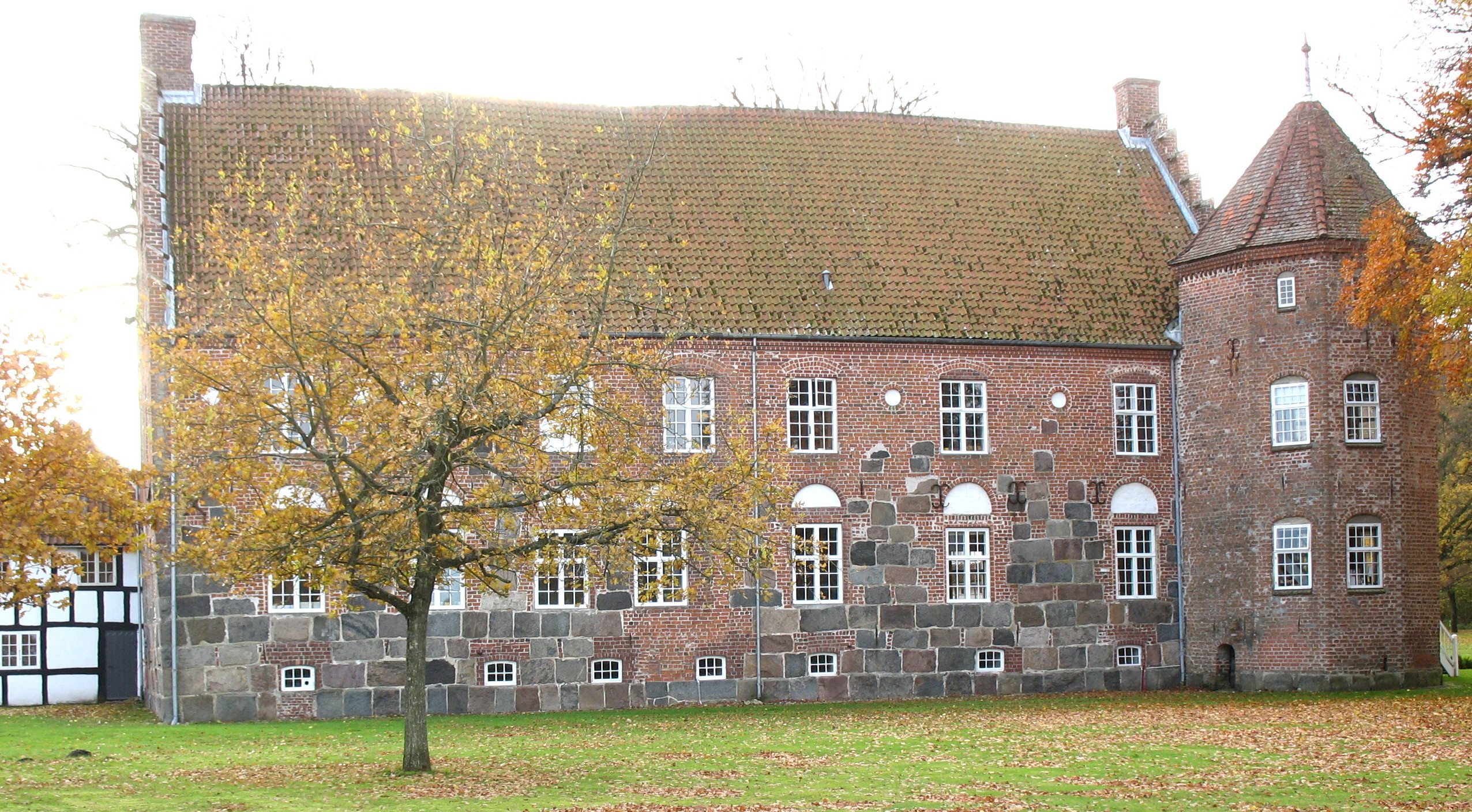 Krabbesholm herregård